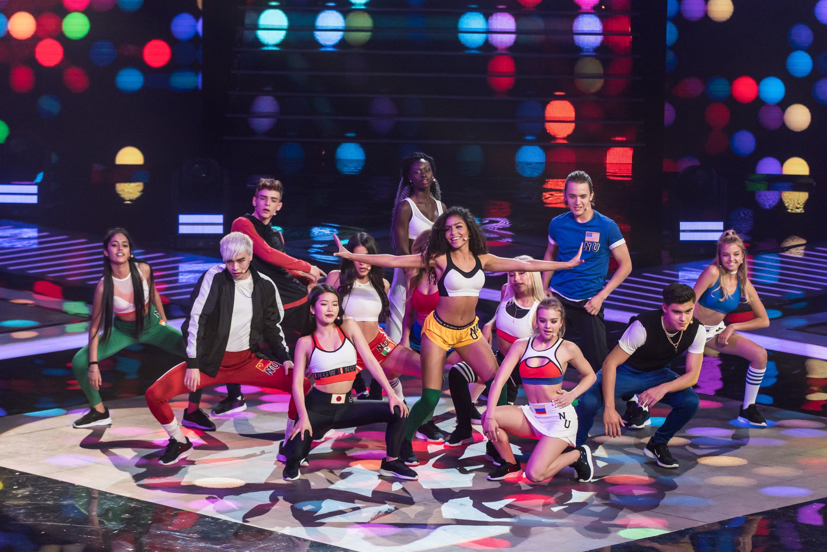 Now United на финале Голос. Дети 5